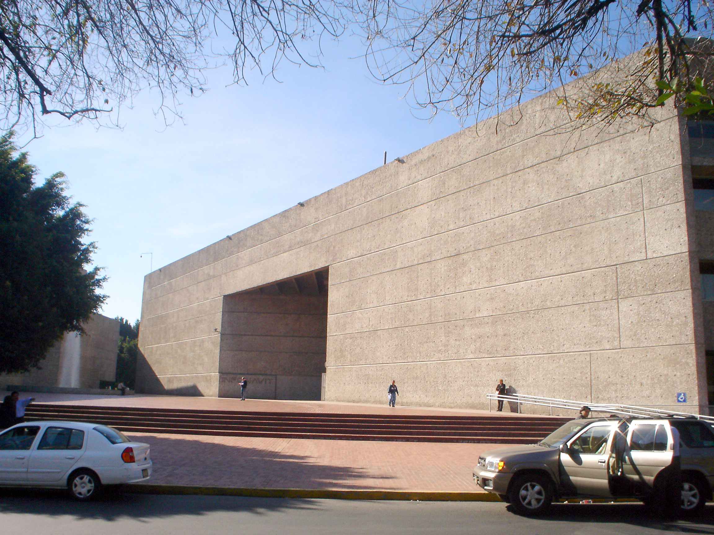 Oficinas centrales del INFONAVIT en la Ciudad de Mexico, ubicadas en la Avenida Barranca del Muerto